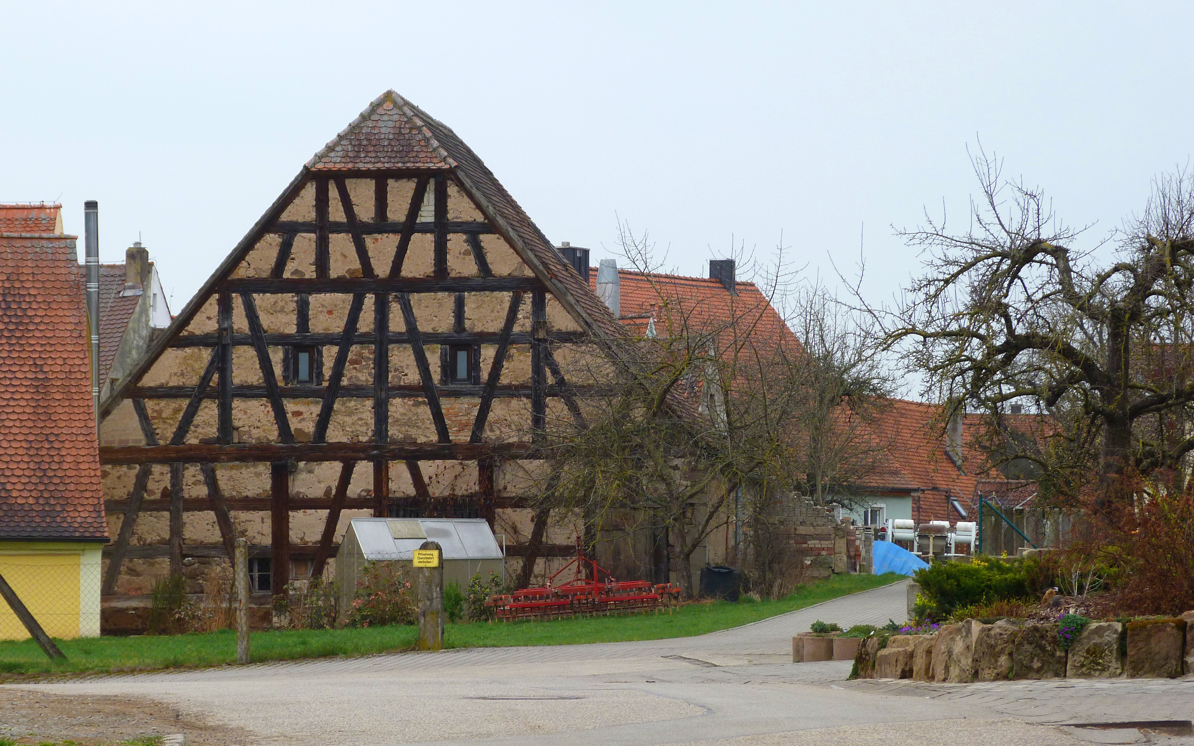 alter Stodl in Sauernheim